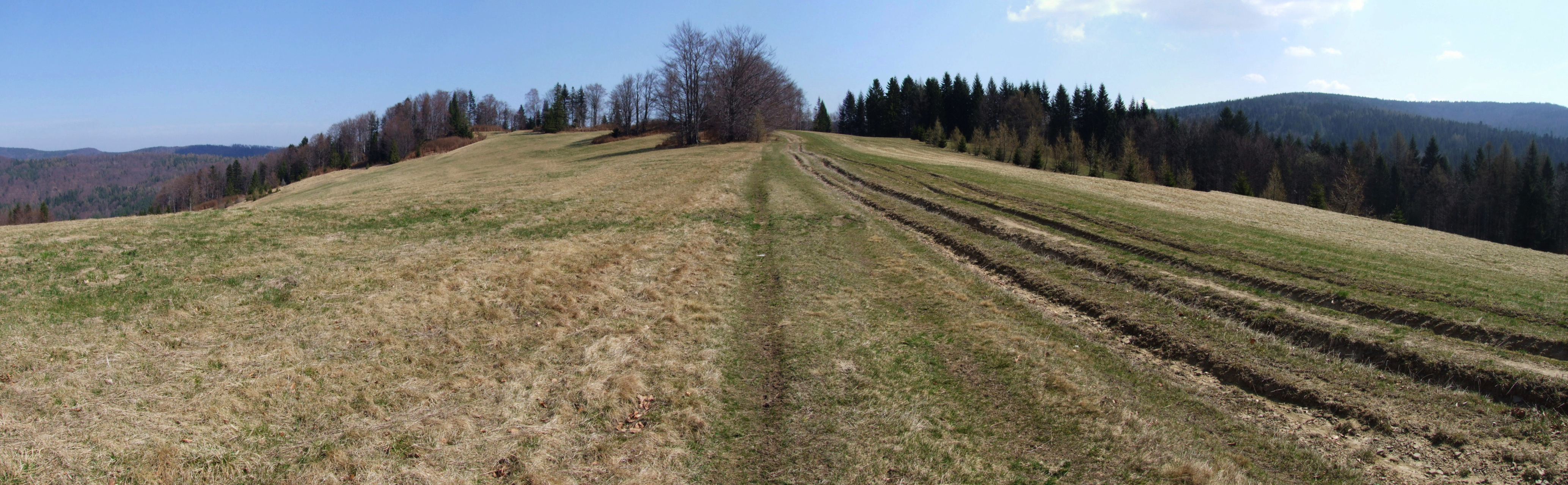 Wyżne Młaki na grzbiecie Runek - Pusta Wielka w Beskidzie Sądeckim (panorama)